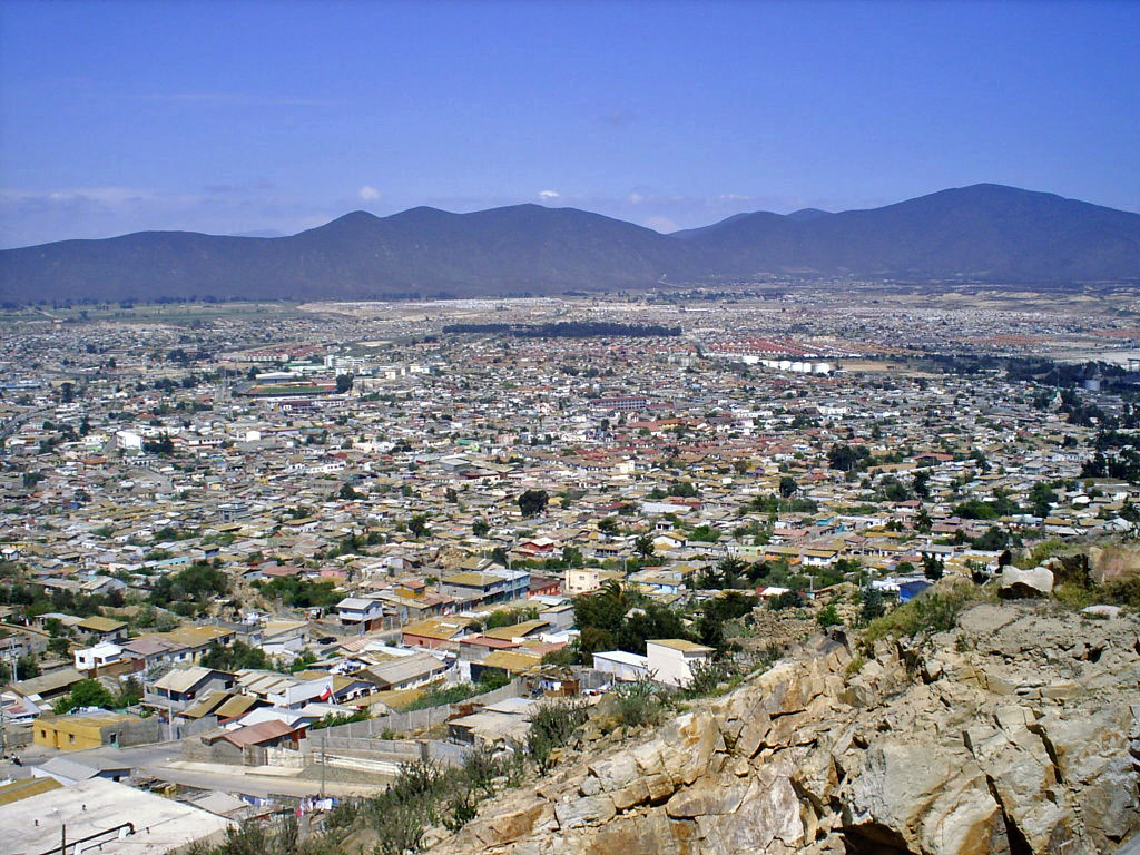 Vista aerea de Coquimbo, foto de autoria propia, obtenida desde las alturas de la cruz del tercer milenio. tomada en septiembre del 2005.